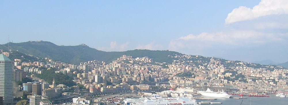 Panorámica de Génova